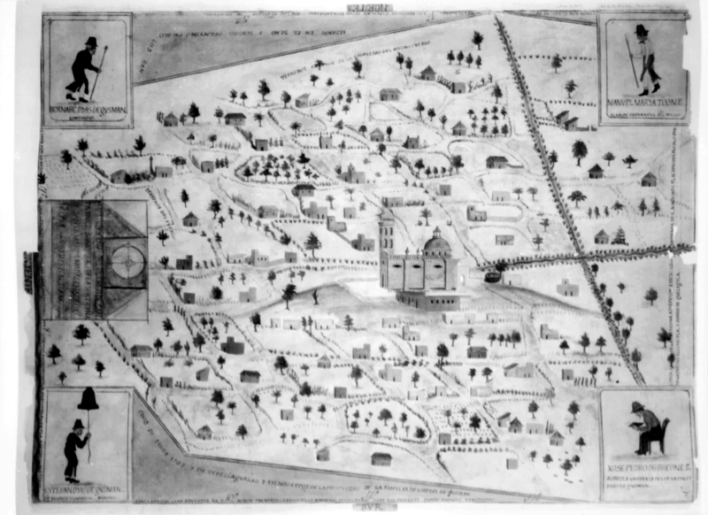 Mapa reprografo de Zacatelco alrededor del siglo XVII